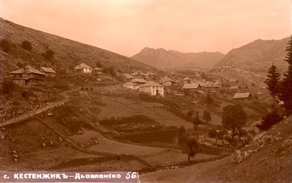 Изглед от с. Кестенджик (с. Кестен, Смолянско).